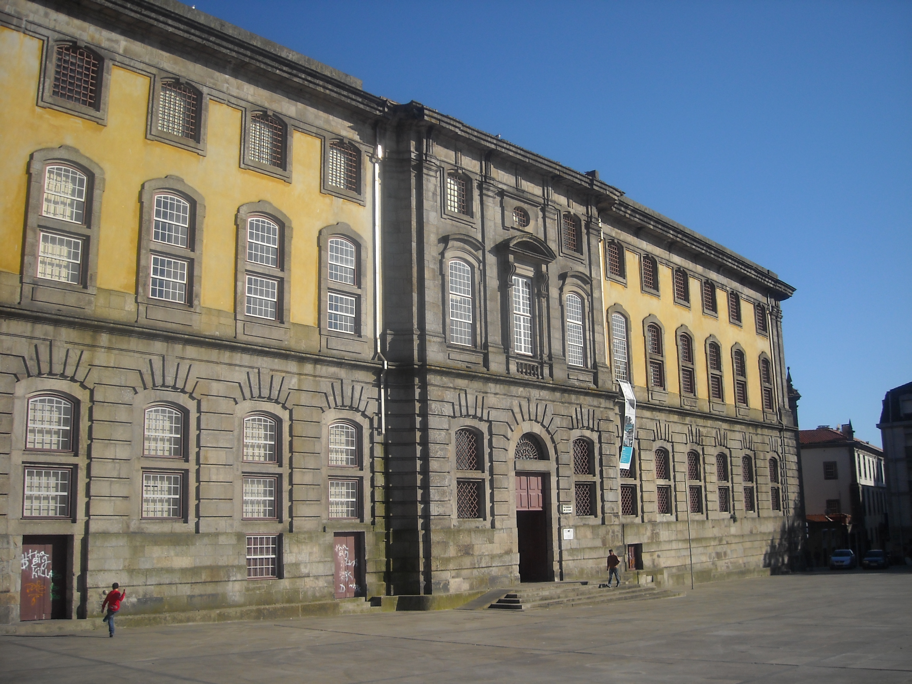 Fachada do Centro Português de Fotografia localizado na cidade do Porto, Portugal.